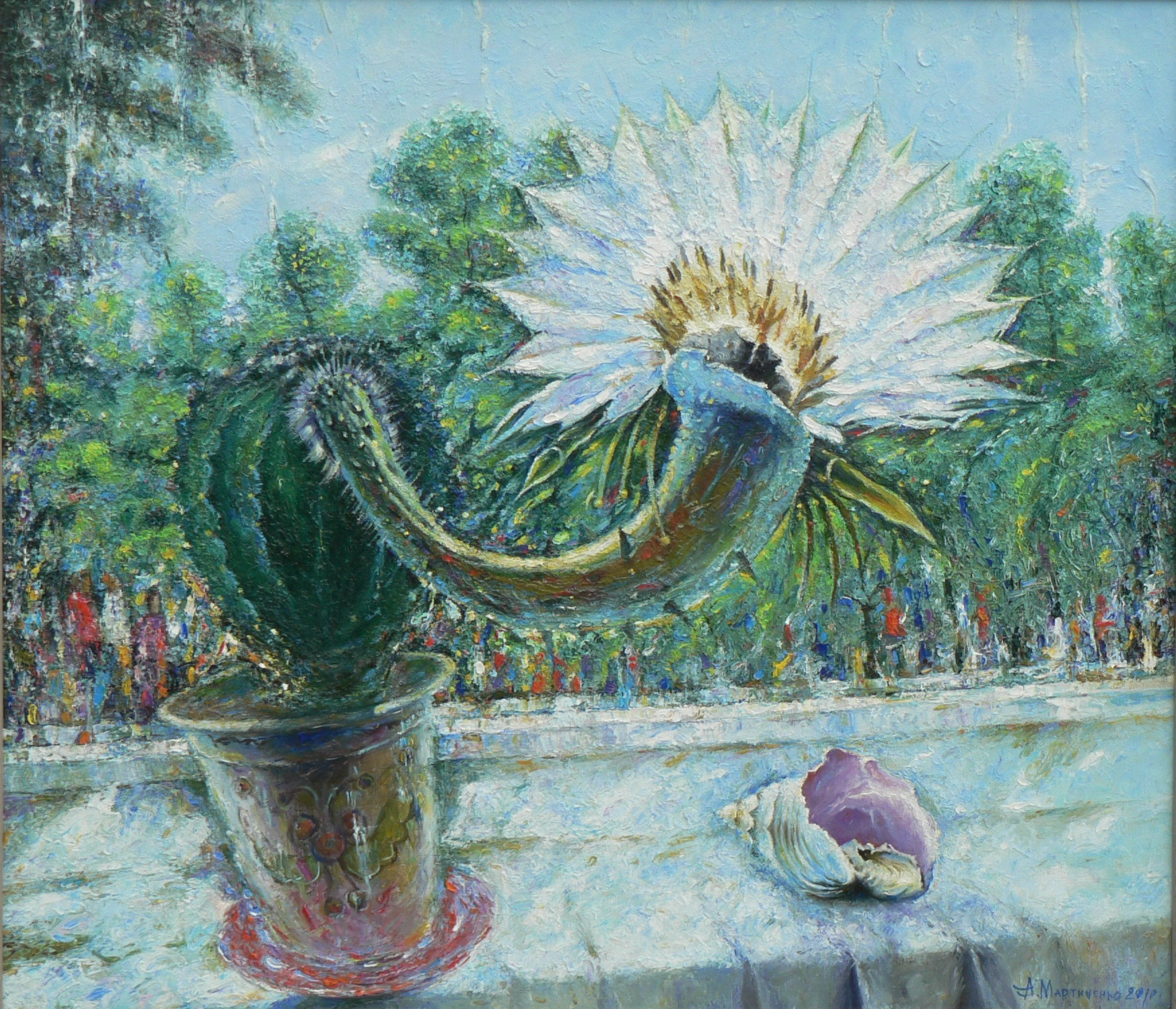 «Квітка кактуса» (2009). Автор Мартиненко Анатолій Іванович